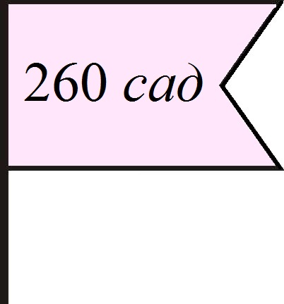 Знак смешанной авиационной дивизии на оперативно-тактическую карту